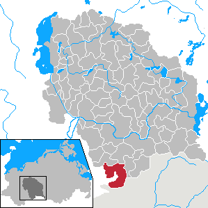 Ziegendorf in Mecklenburg-Vorpommern - District Parchim